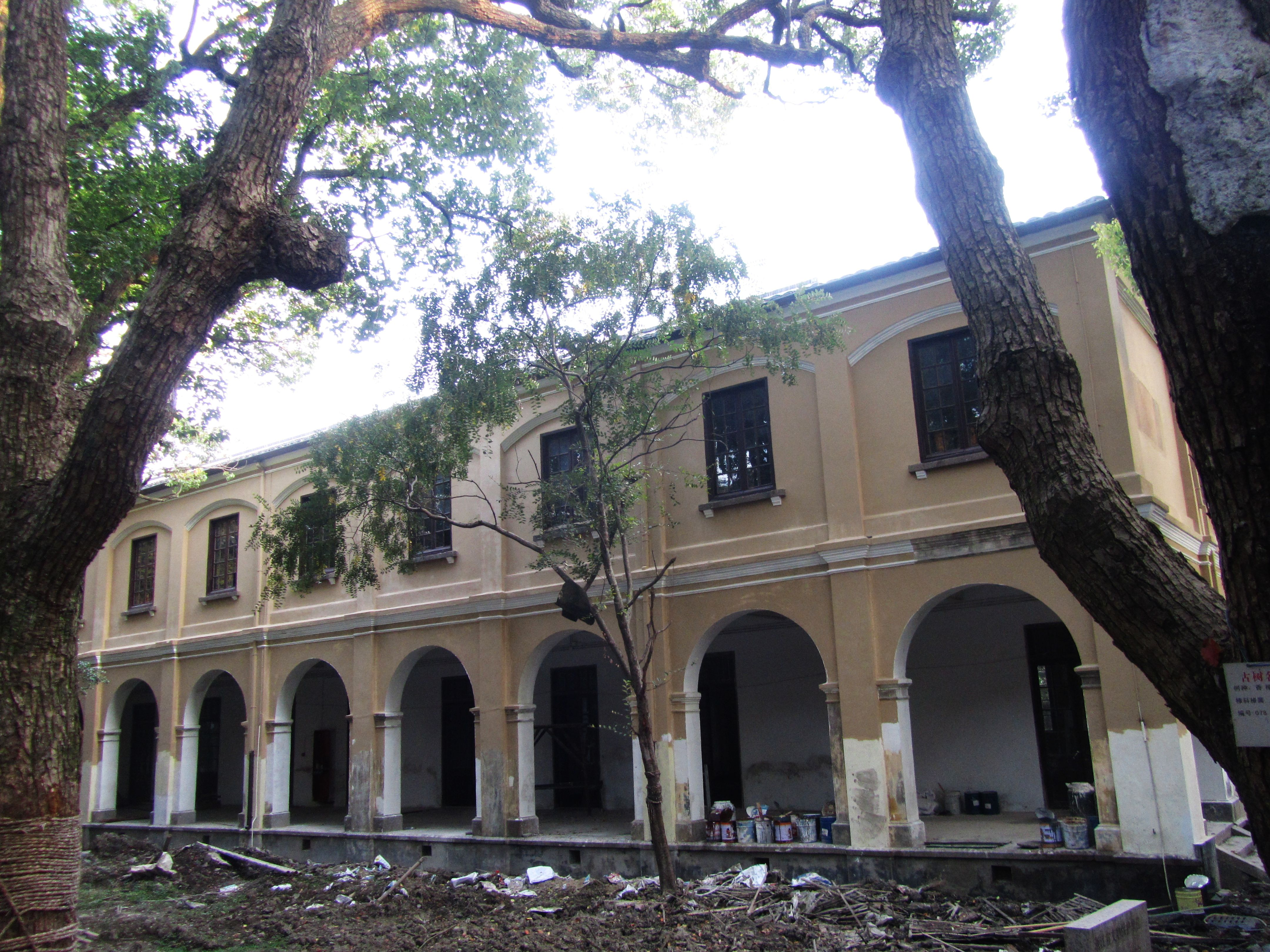 嘉兴文生修道院，南翼内侧。